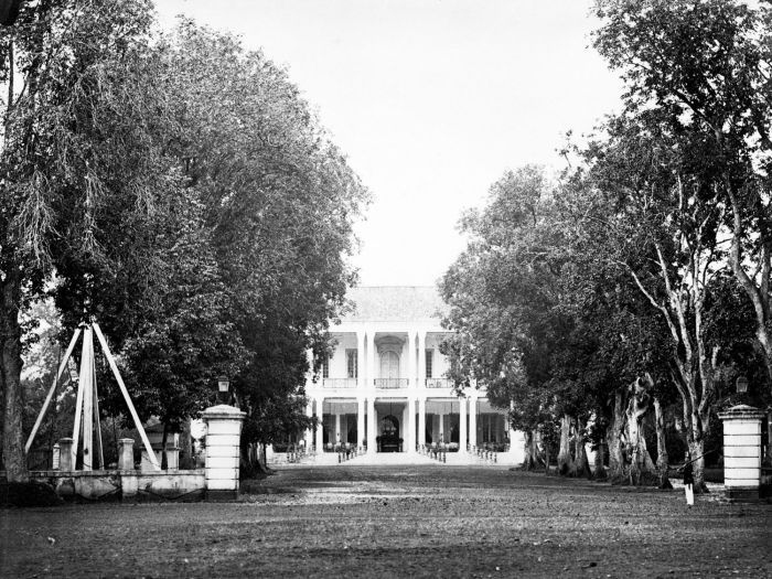 Foto. Album beslaat souvenir foto's van Java. Residentie huis in Semarang